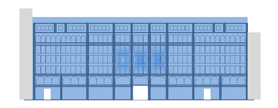 Fassadenstruktur des Levantehauses in Hamburg, Deutschland, Ansicht von der Mönckebergstraße. Façade of the Levantehaus in Hamburg, Germany, view from Mönckebergstraße.